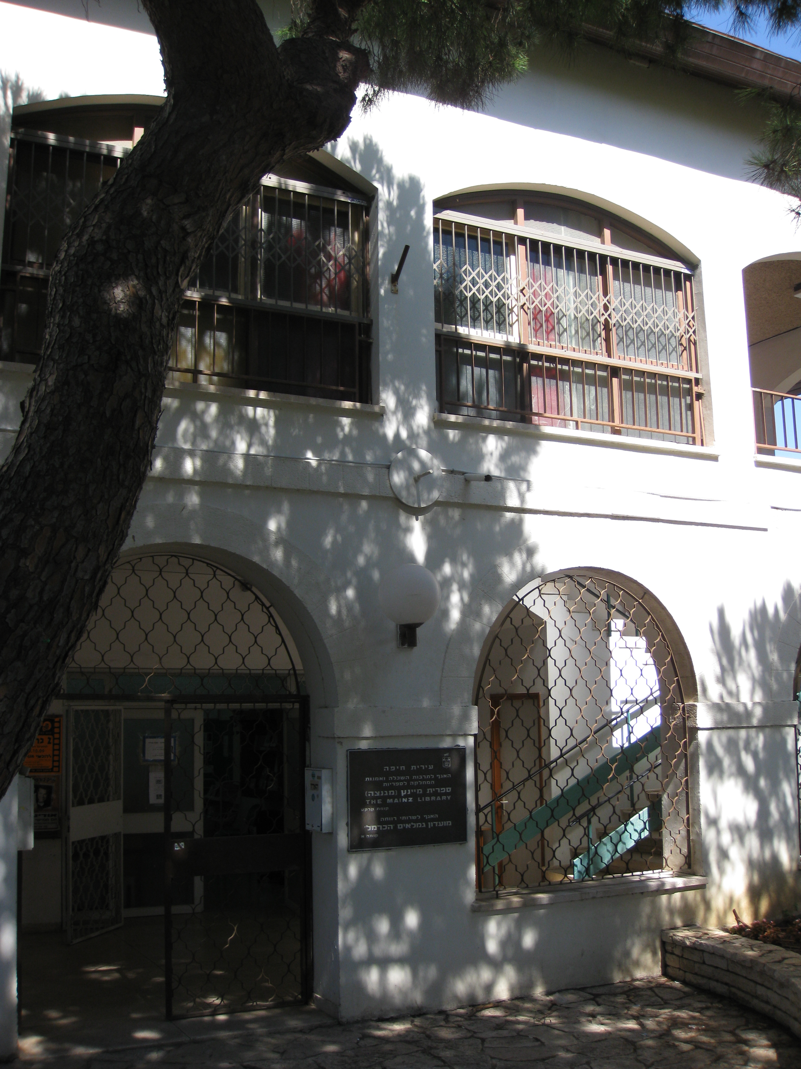 Carnelheim - the German Colony on Carmel Mountain (today part of the Carmel Centre neighborhood) The Meinz Library - A templar House used as a municipal Library ספריית מיינץ- כיום ספריה עירונית כרמלהיים - מושבה גרמנית שעל הכרמל כיום חלק משכונת מרכז הכרמל בחיפה